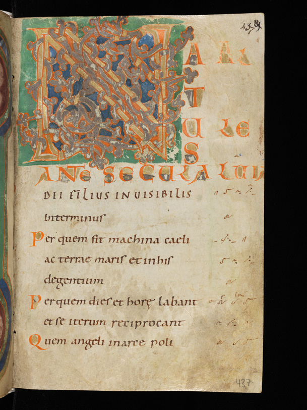 Cod. Eins. 121, Beginn der Sequenz "Natus ante saecula", S. 437